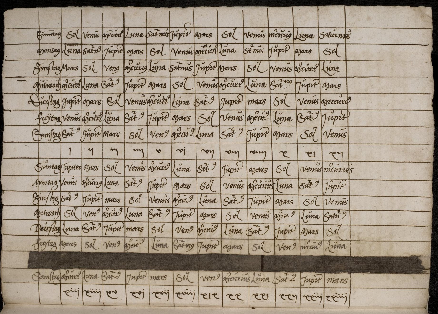 Codex Palatinus germanicus 1, "Astrologisch-medizinische Sammelhandschrift", Blatt 19v der Handschrift (gedreht): "Planetentafel"